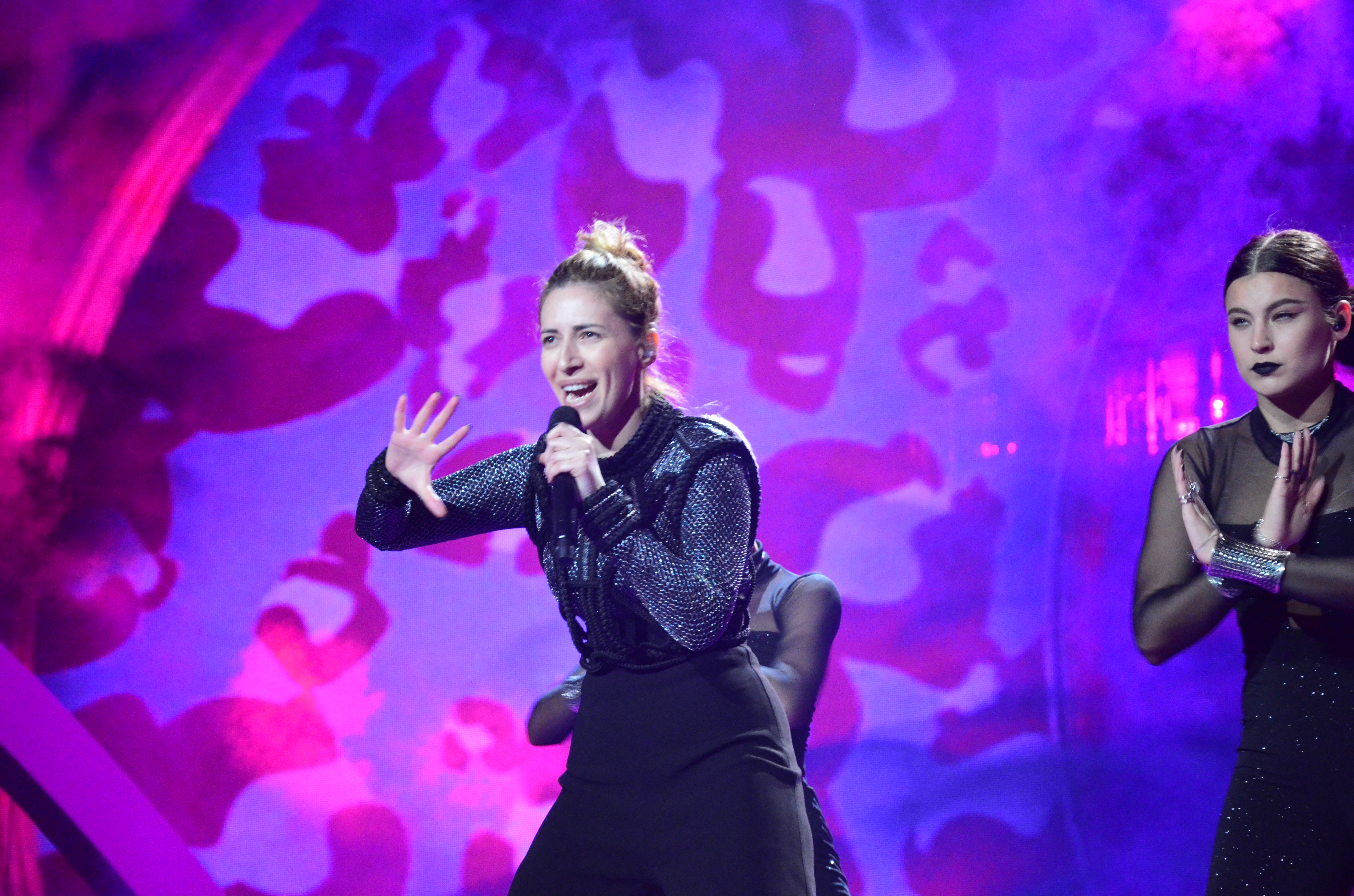 12 травня. Генеральна репетиція фіналу Євробачення 2017. Artsvik (Armenia).